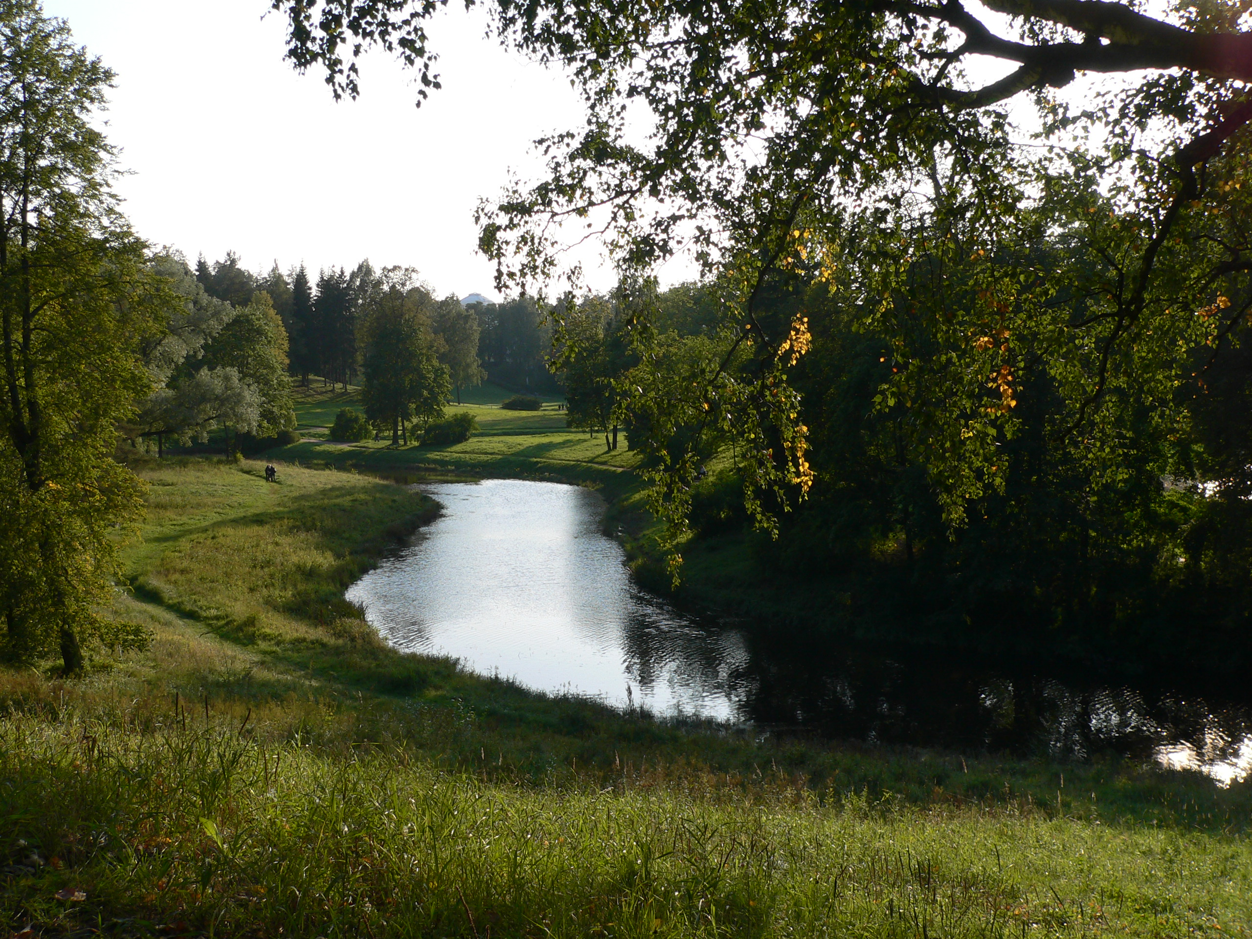 Река Славянка осенью.